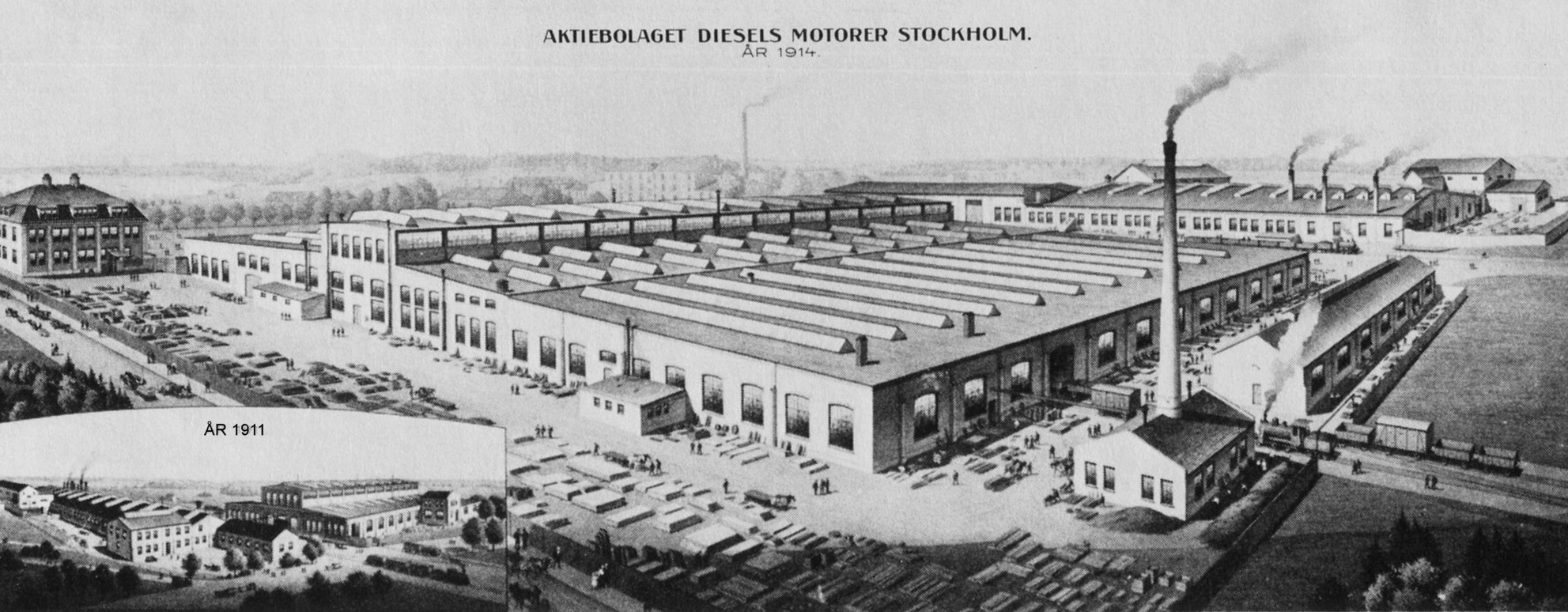 Dieselverkstadens monumentala basilikaliknande monteringshall uppfördes åren 1908-1909. Ursprungligen var byggnadens omfattning tämligen blygsam med mittskepp och två flankerande sidoskepp. Omkring åren 1910-1911 förlängdes byggnaden söderut med nästan det dubbla - från 7 till 12 fönsterfack -, och dessutom breddades byggnaden med två fack. År 1914 sker ytterligare en tillbyggnad med en mindre byggnad åt väster och en stor verkstadshall, den s.k. B-verkstaden, åt öster. Till höger bakom Dieselverkstaden ligger den ursprungliga verkstadsbyggnaden, uppförd 1898, och längst till vänster Tekniska kontoret, uppfört 1913. Bägge dessa byggnader är bevarade. Lilla bilden visar fabriken 1911.